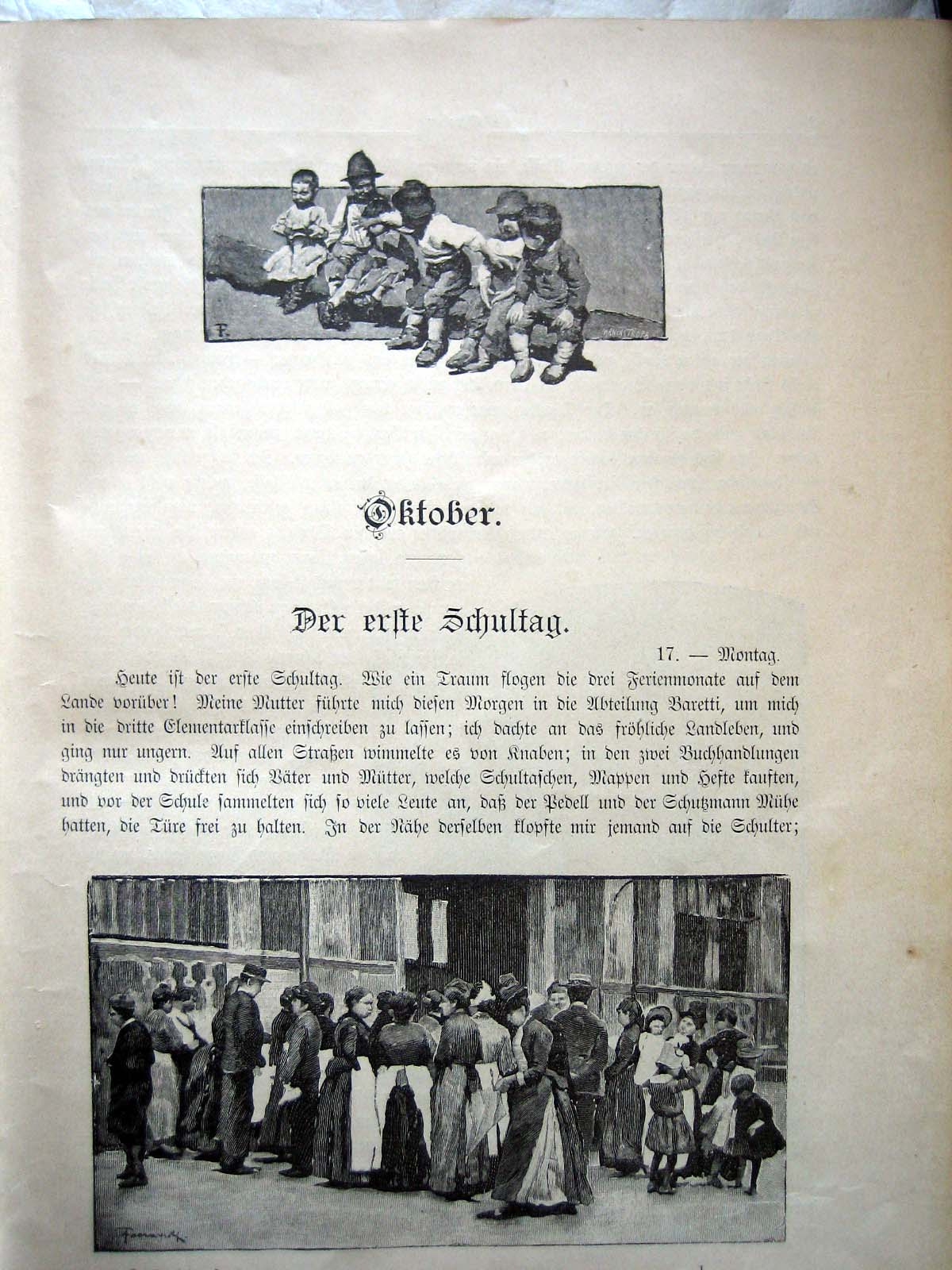 Anfang von 'Herz' aus dem Jahr 1894